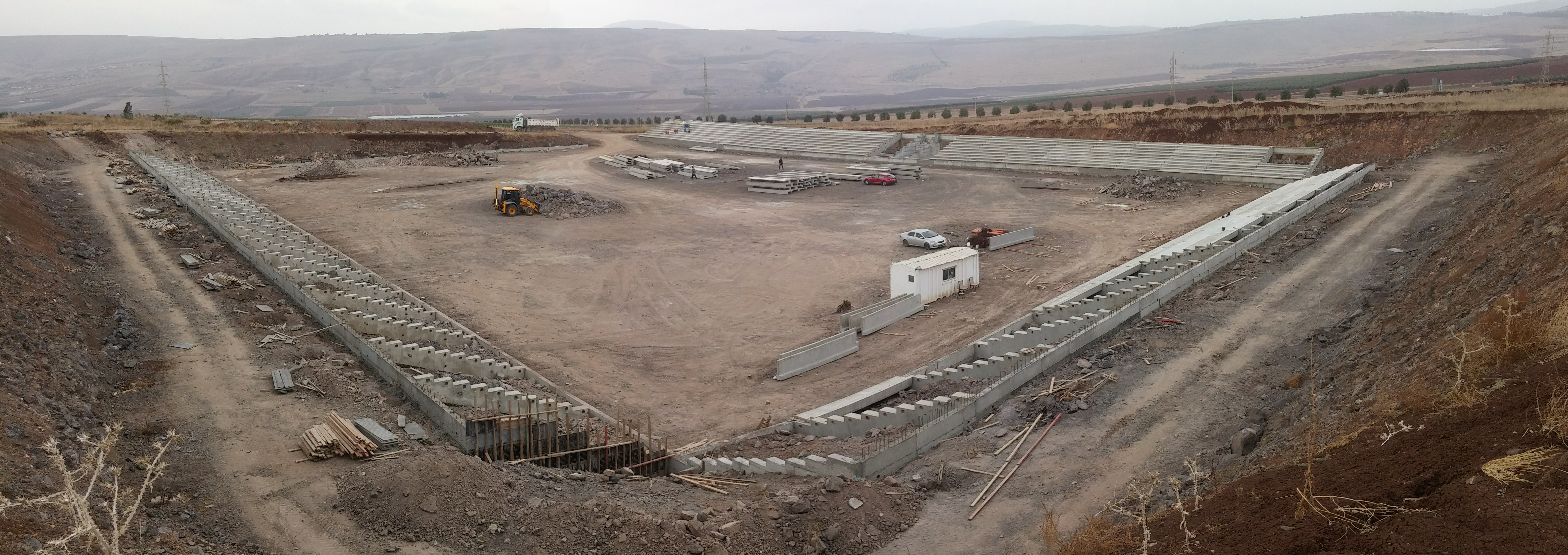 Tiberias Football Stadium